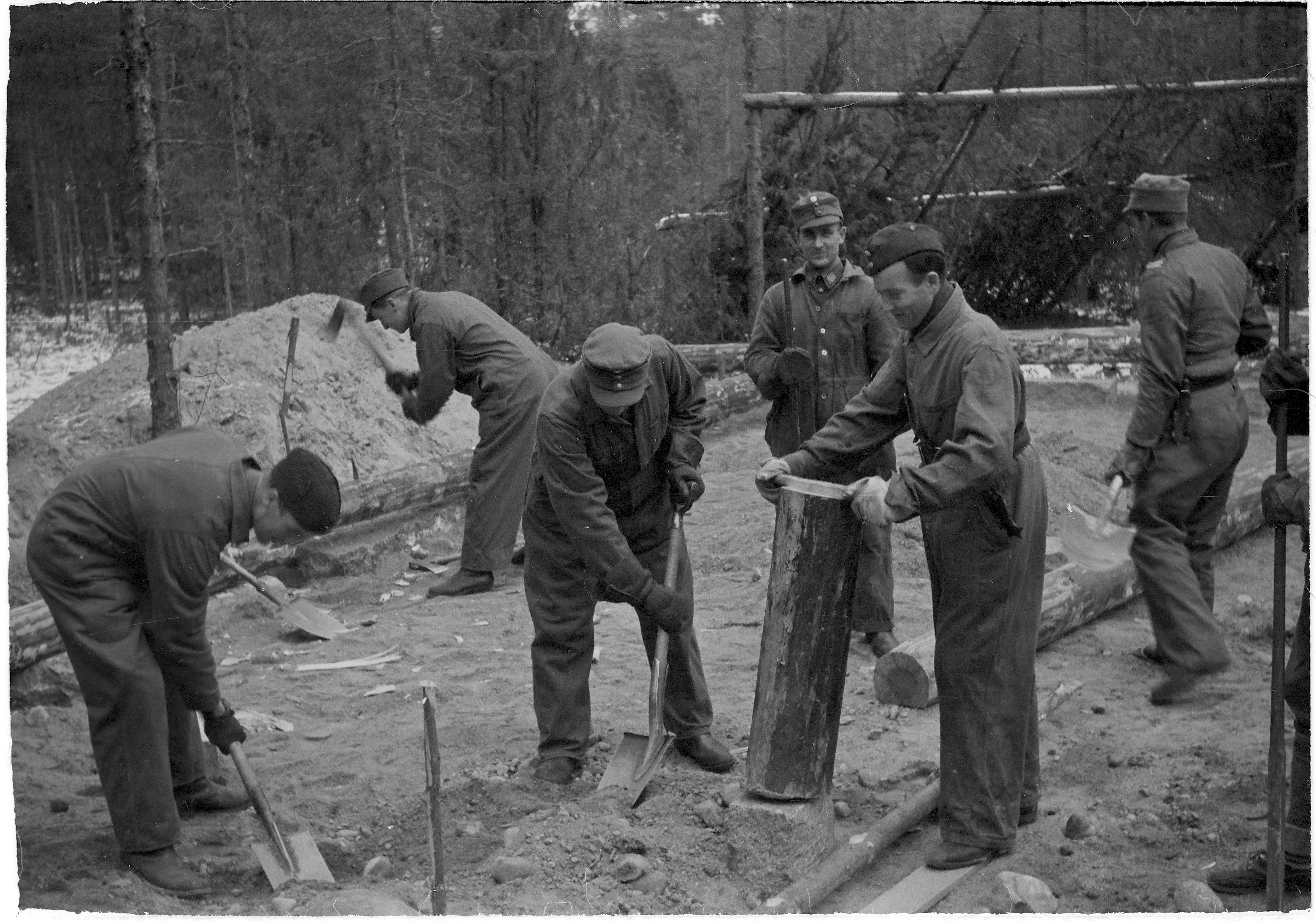 Majuri Larjon laivueen kakkoslentueen miehet rakennustalkoissa Suulajärven lentokentällä.